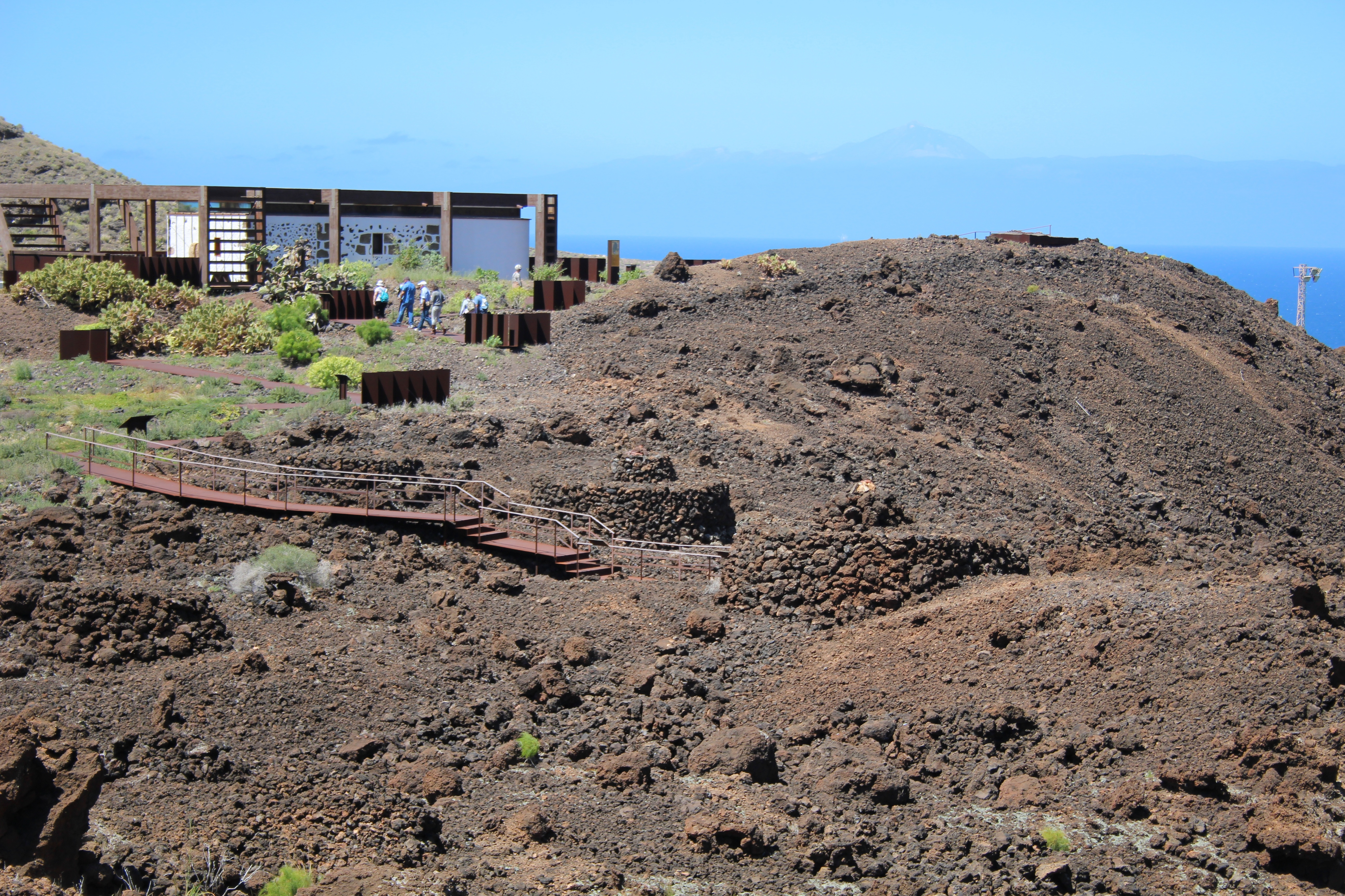 Necrópolis de Maipés de Arriba, Agaete, Gran Canaria. Esta necrópolis está situada en una zona volcánica de 5000 años de antigüedad. Originalmente disponía de más de 700 túmulos, pero se han visto afectados por los expolios y la actividad agrícola. Los primeros túmulos datan del 700 dC.